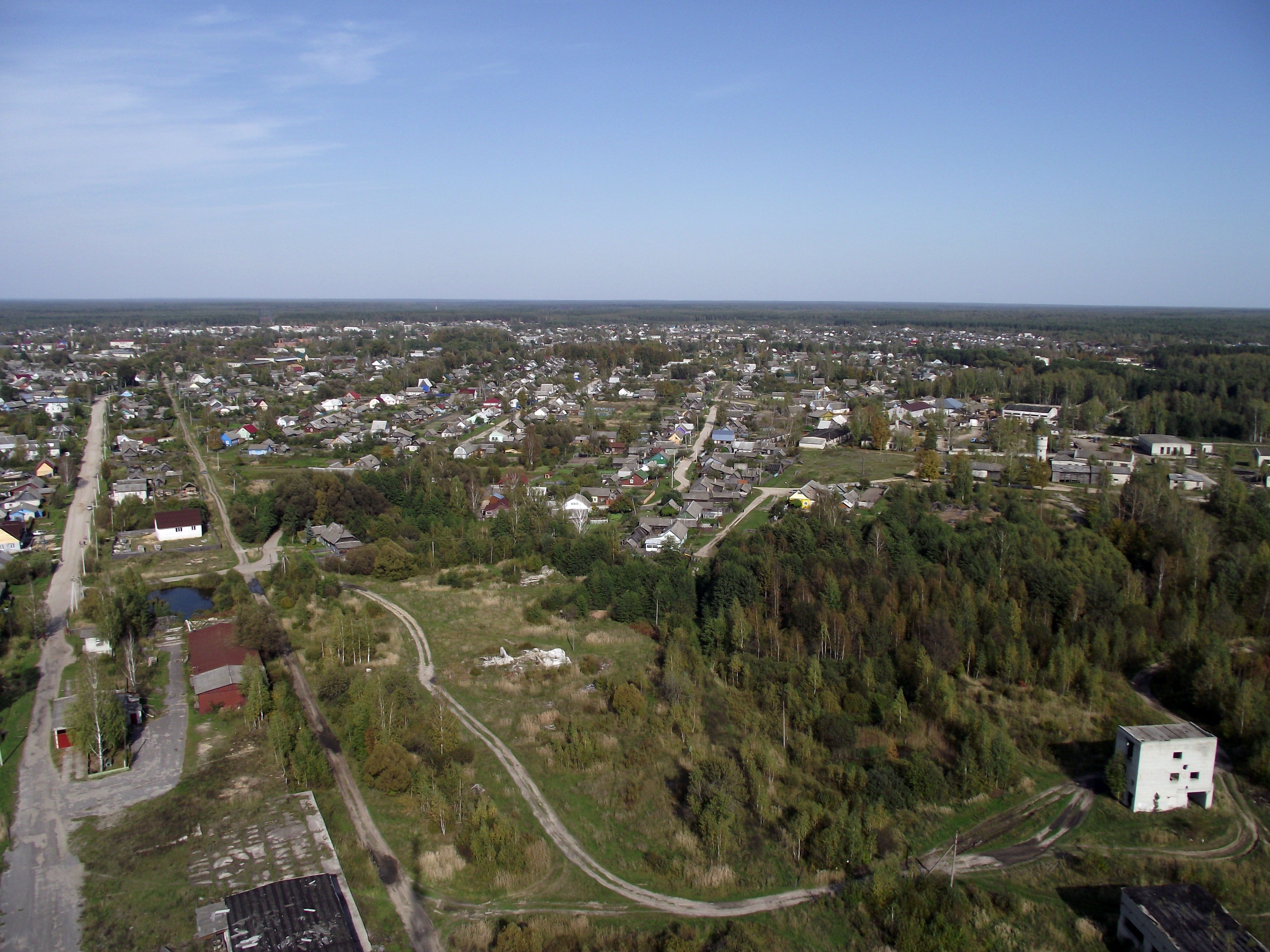 С высоты.